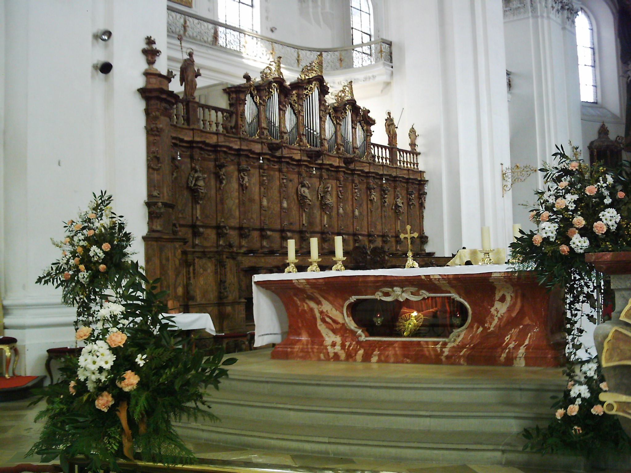 Der Heilig Blut Altar Basilika Weingarten mit Heilig Blut Reliquie (beleuchtet) im Hintergrund Chorgestühl.